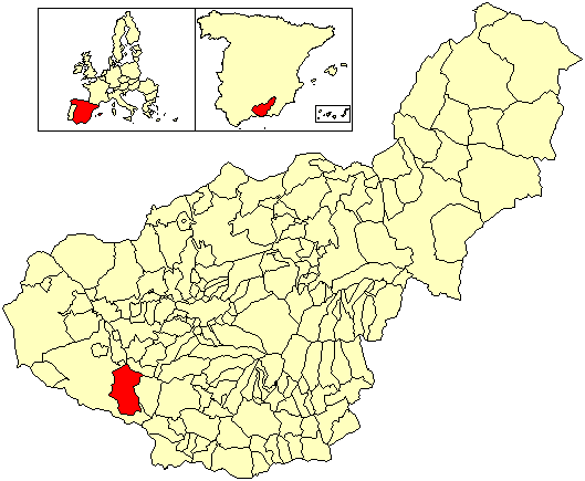 Situación del término municipal de Arenas del Rey respecto a la provincia de Granada, en España.